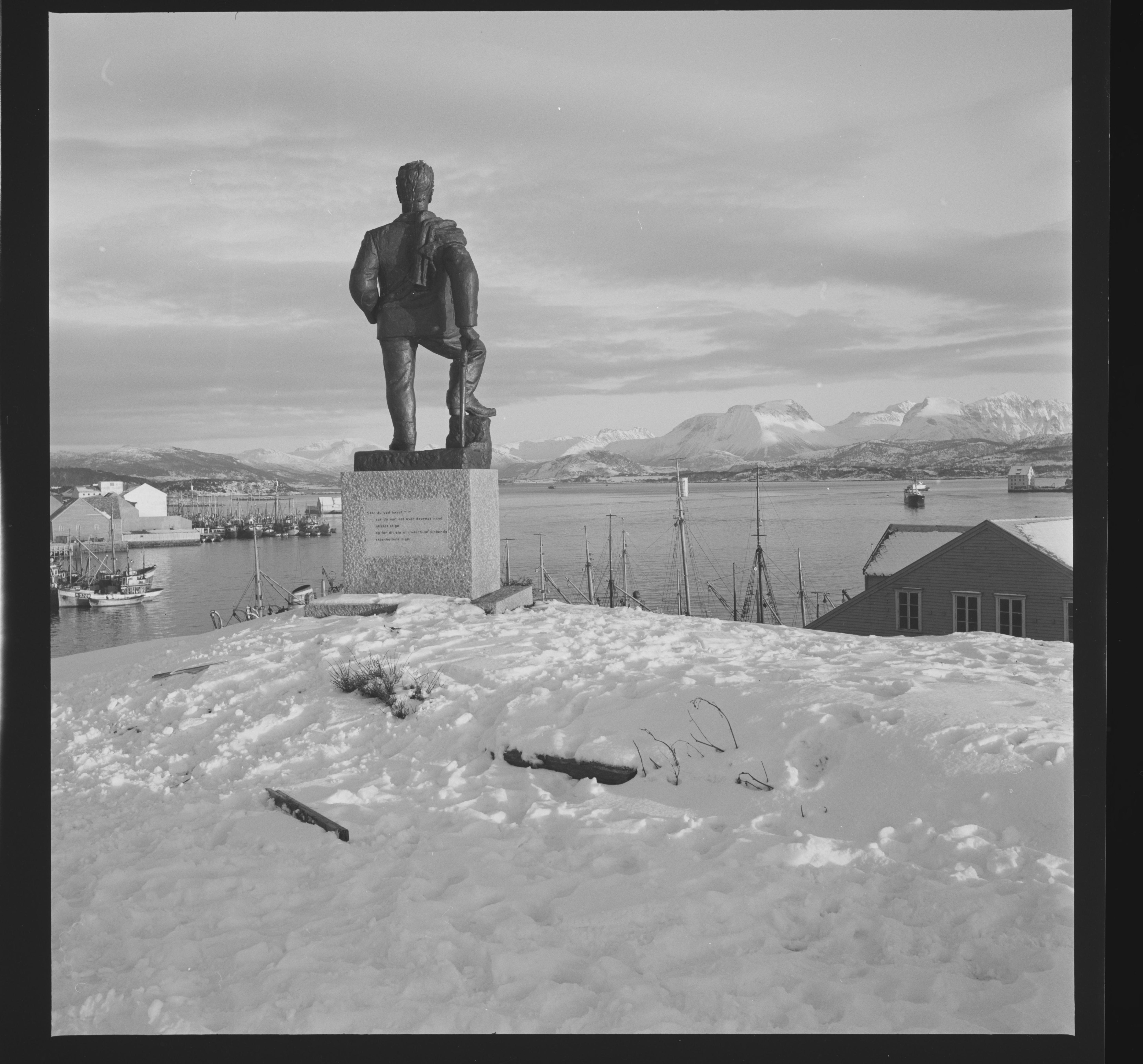 Bildet er hentet fra Nasjonalbibliotekets bildesamling Ålesund, Ålesund, Møre og Romsdal